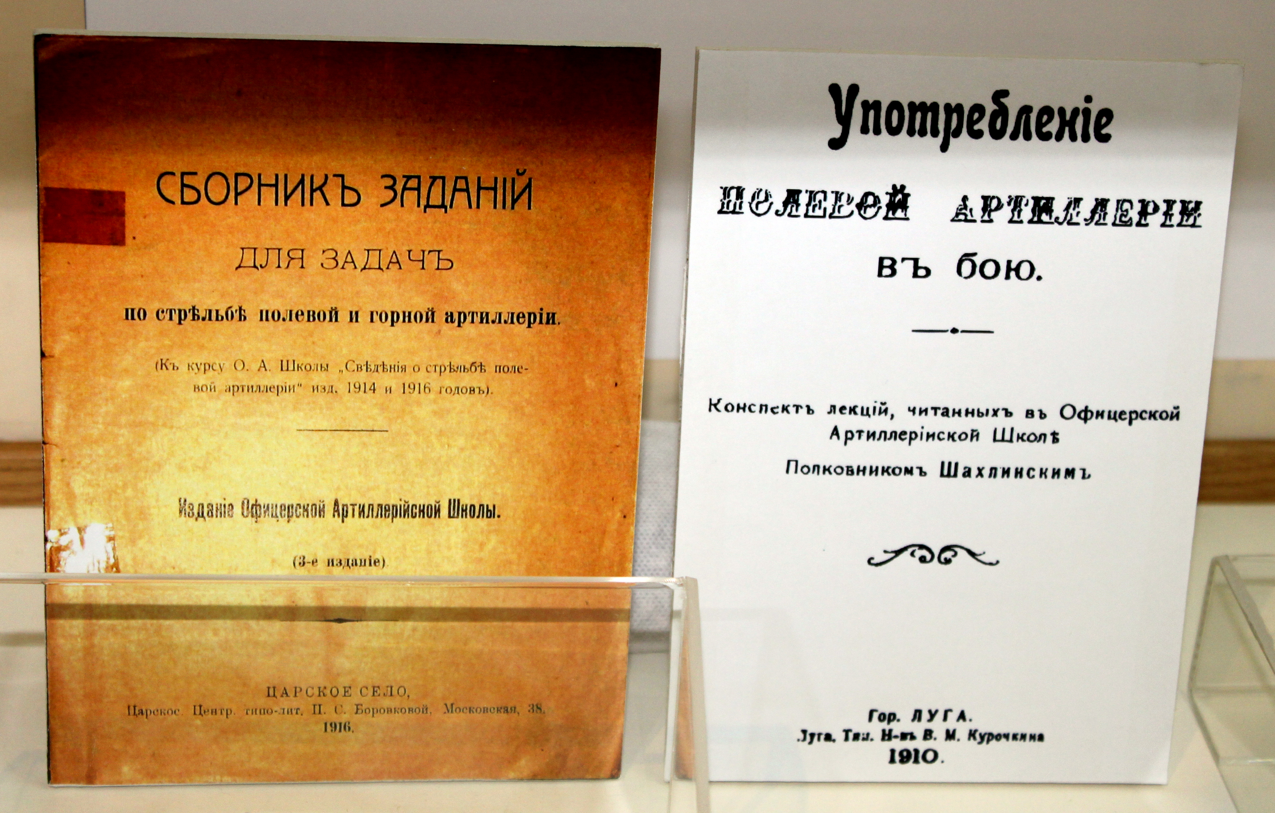 Əliağa Şıxlinski tərəfindən yazılmış kitablar